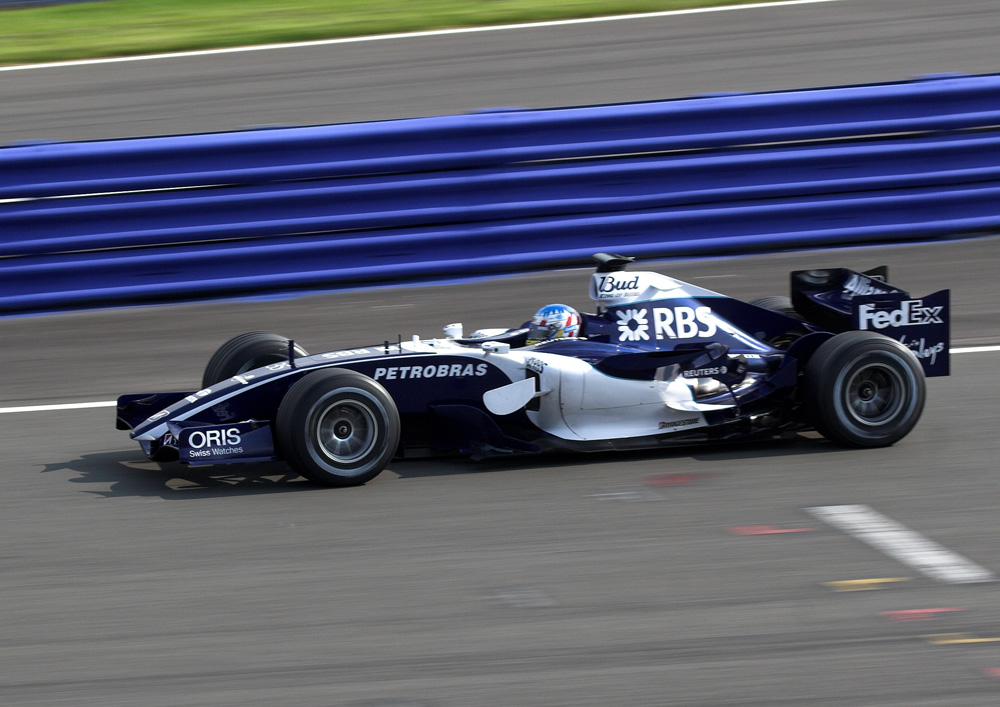 Alexander Wurz WilliamsF1 FW28